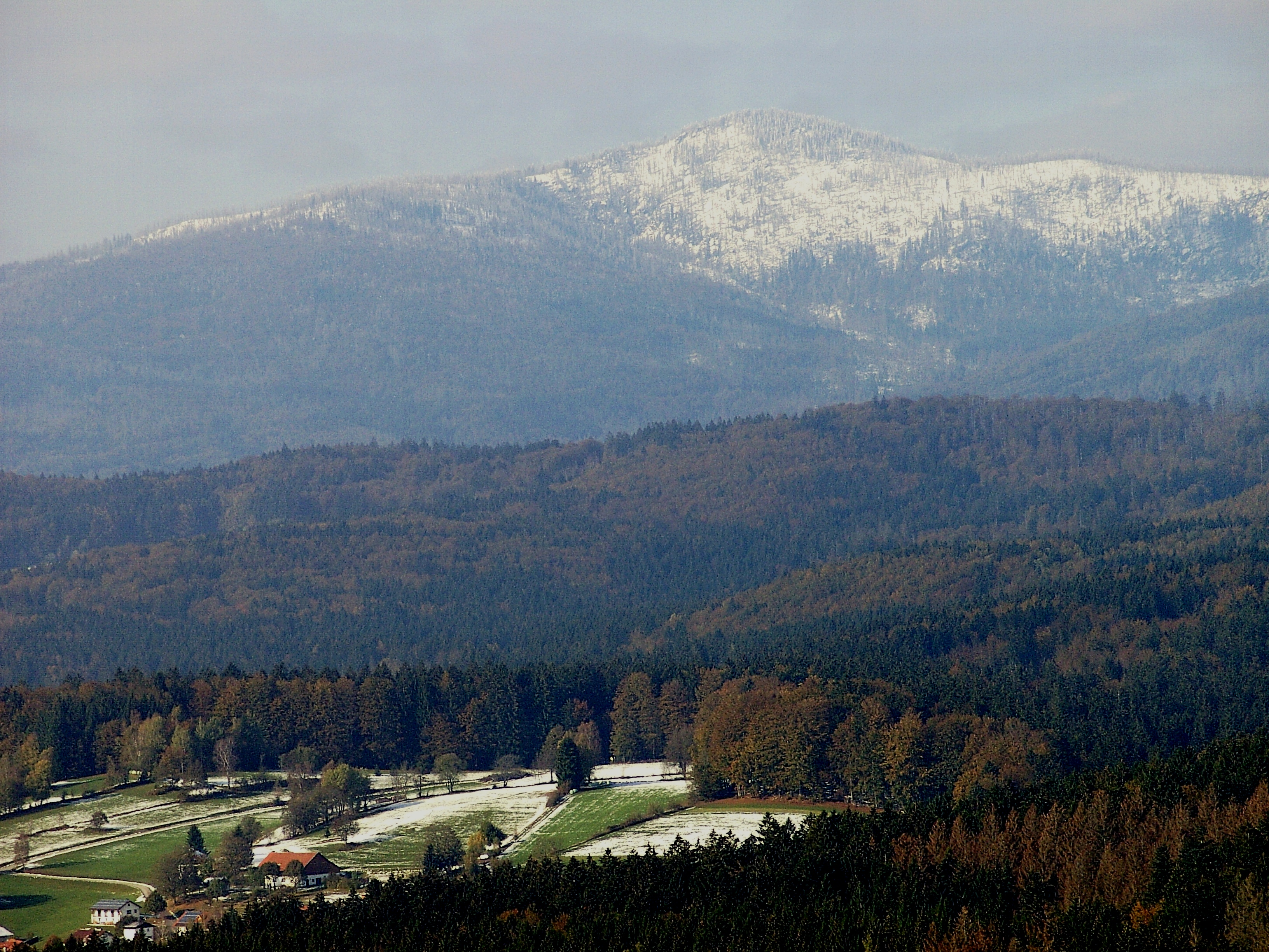 Der, in Schnee gehüllte, Große Rachel (Höhe 1.453 m) vom Baumturm des Baumwipfelpfades in Neuschönau aus gesehen.